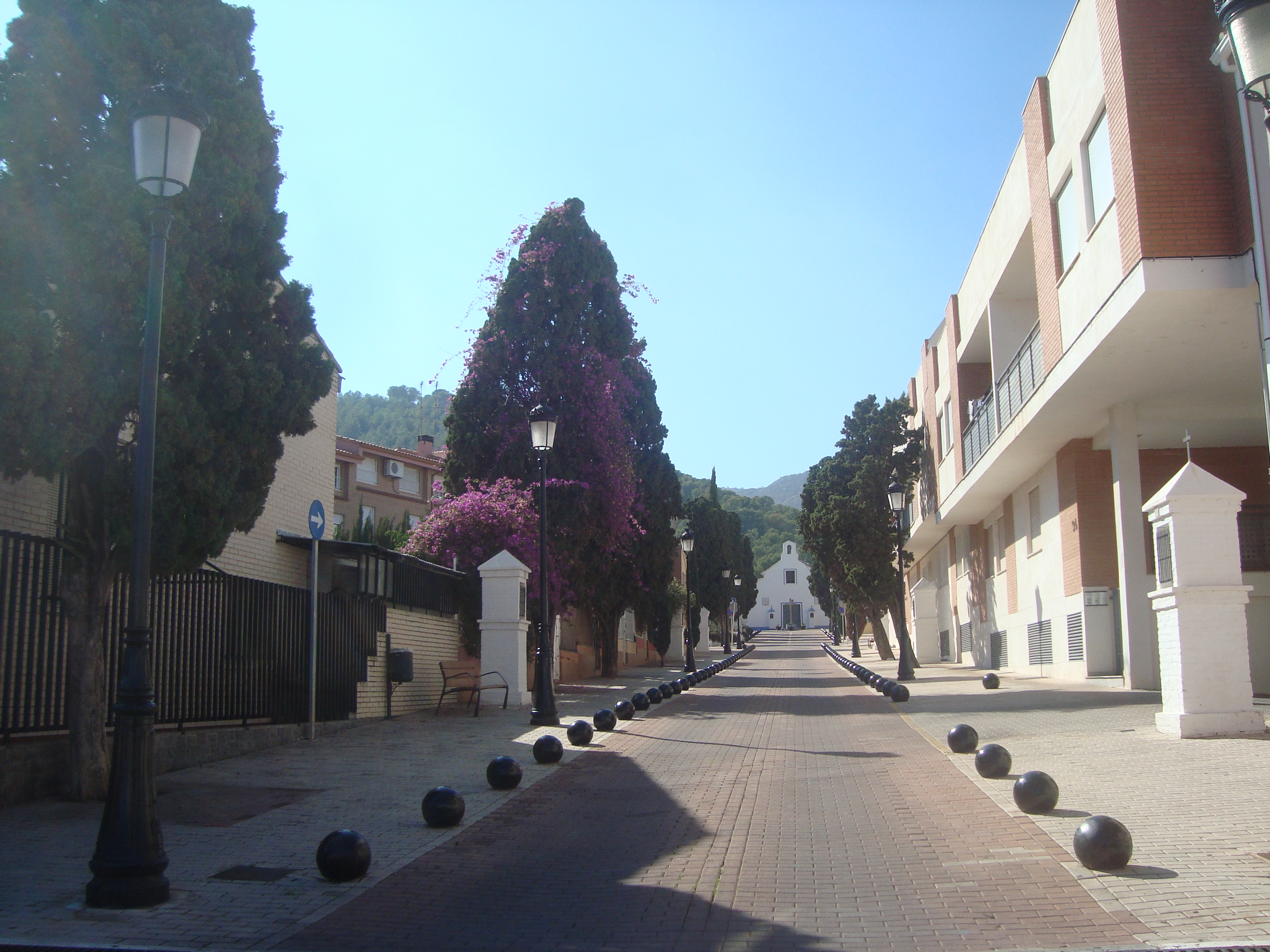 Ermita de Santa Bàrbara (Faura) 12.122-002.